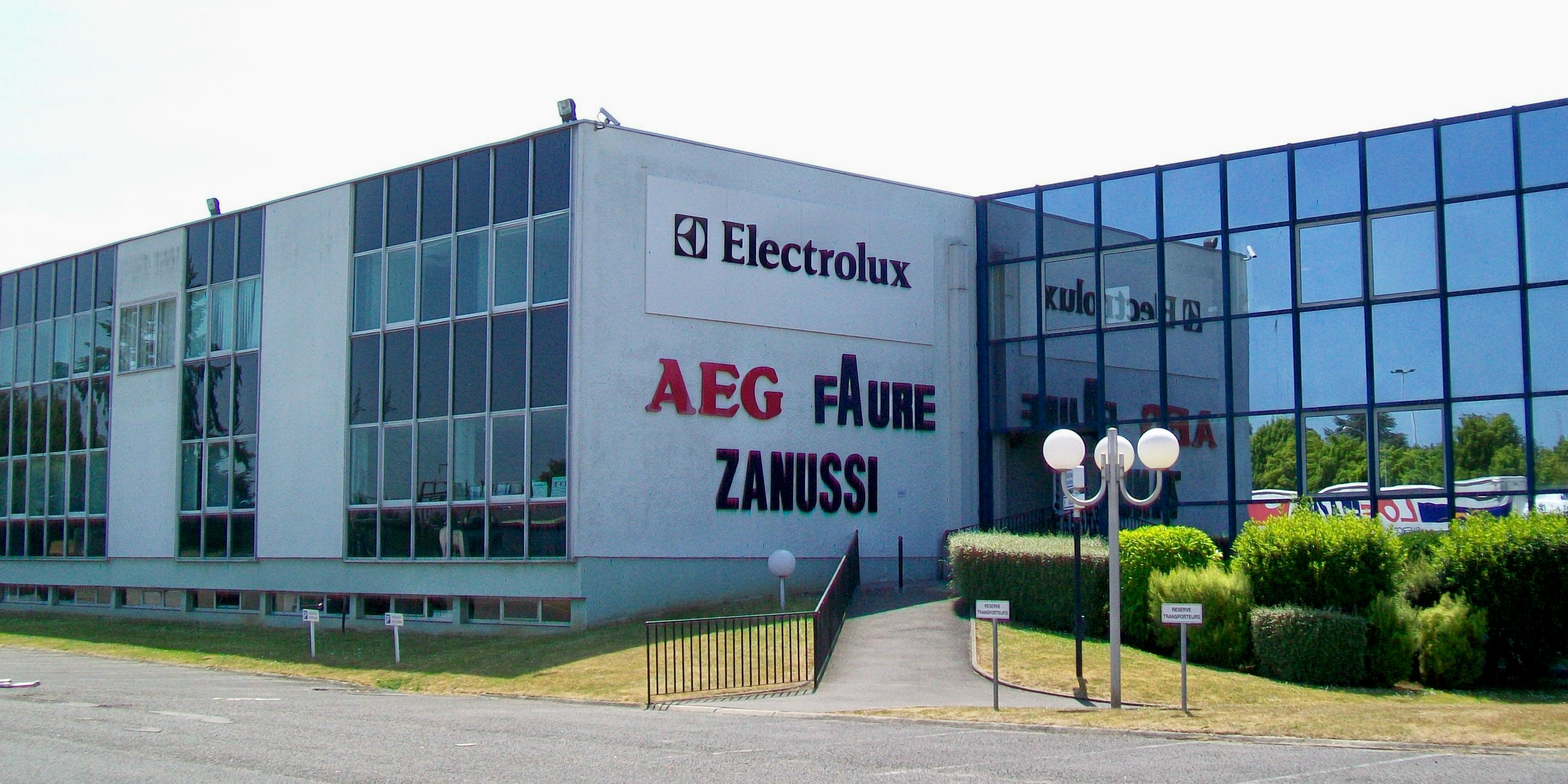 Electrolux, avenue Félix-Louat : entrée principale.